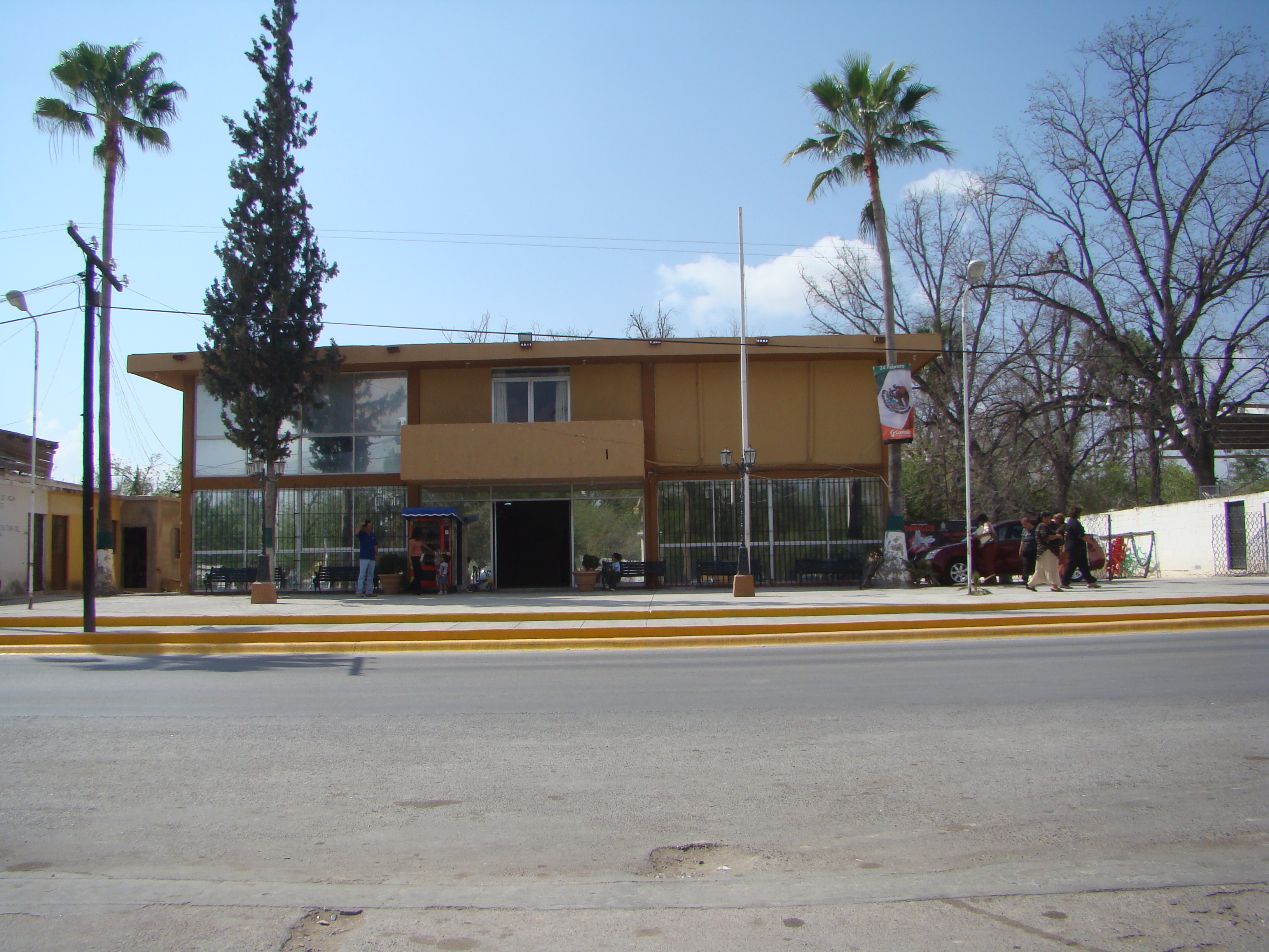 Palacio Municipal de Nadadores Coah.